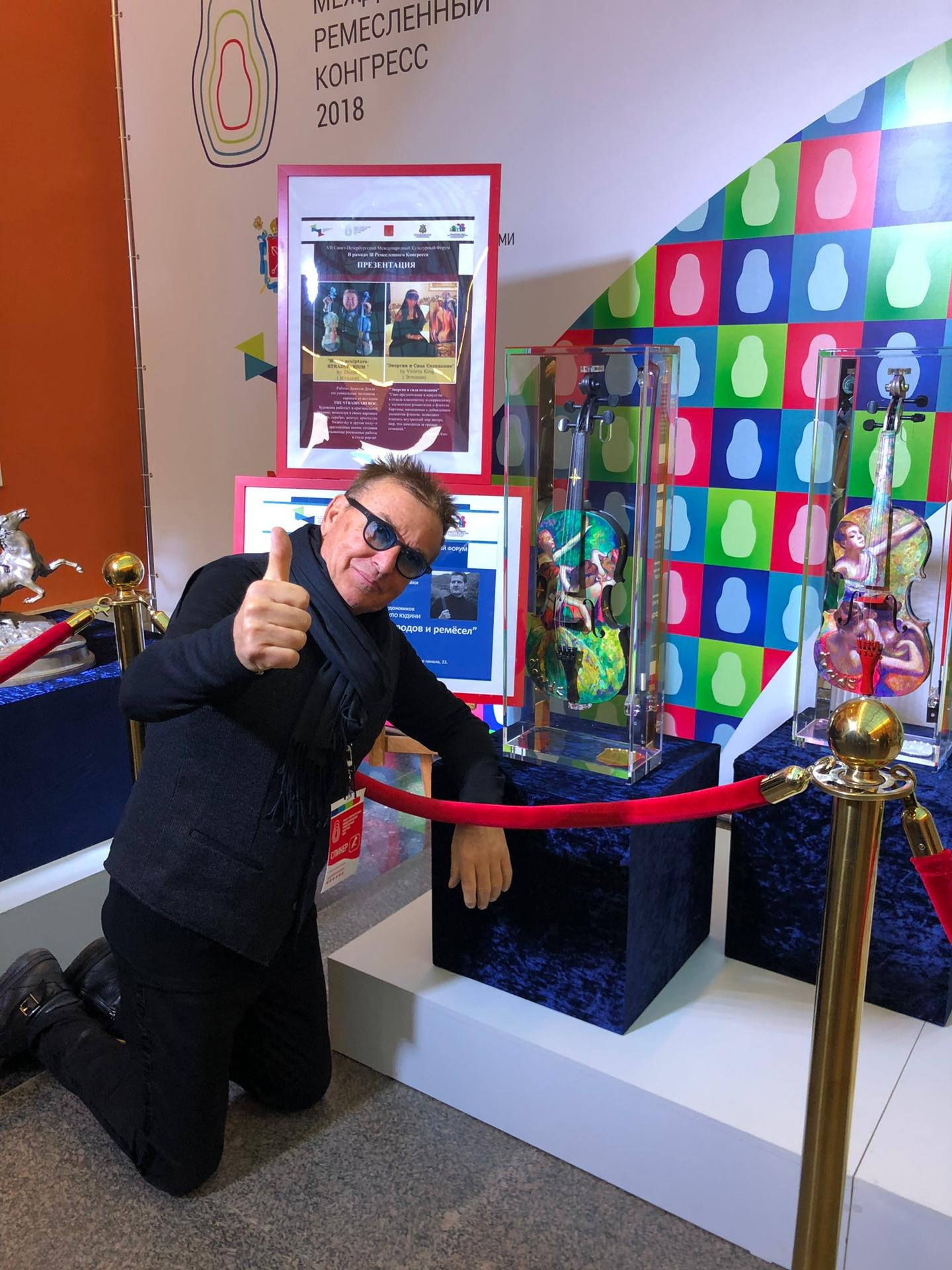 Daniele Dondé – offizieller Gast am VII Saint Petersburg International Cultural Forum